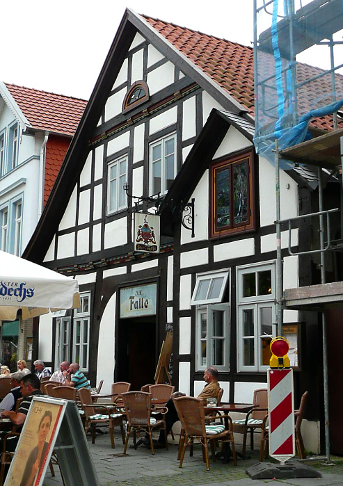 Bückeburg Gaststätte Falle